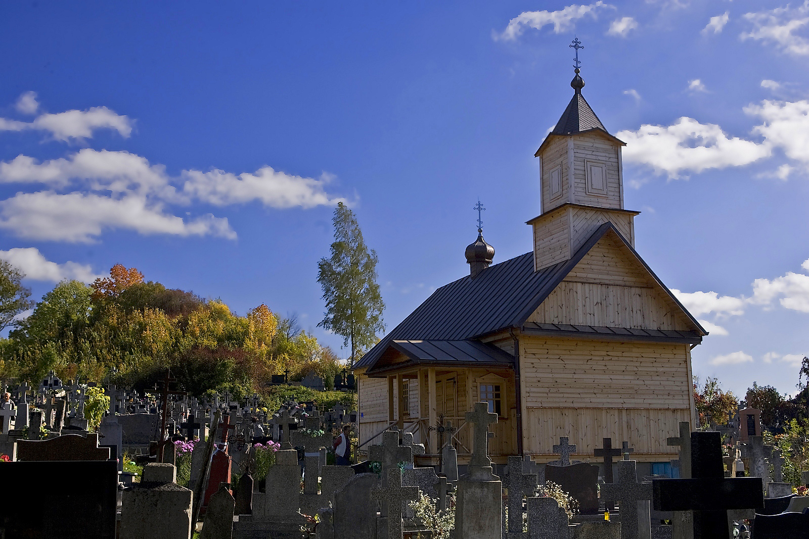 Kaplica gr.-kat. cmentarna, ob. prawosławna p.w. Matki Boskiej Opiekuńczej, drewn., ok. 1770 Mielnik, Mielnik 08.1985.